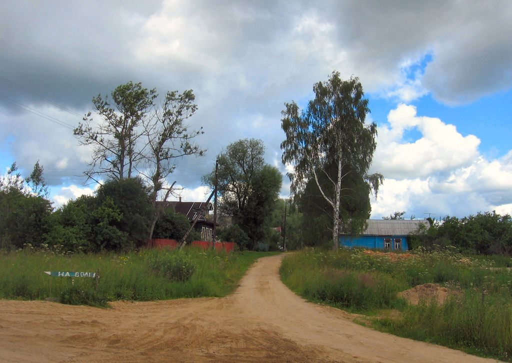 Деревня Калошино (Старицкий район Тверской области)